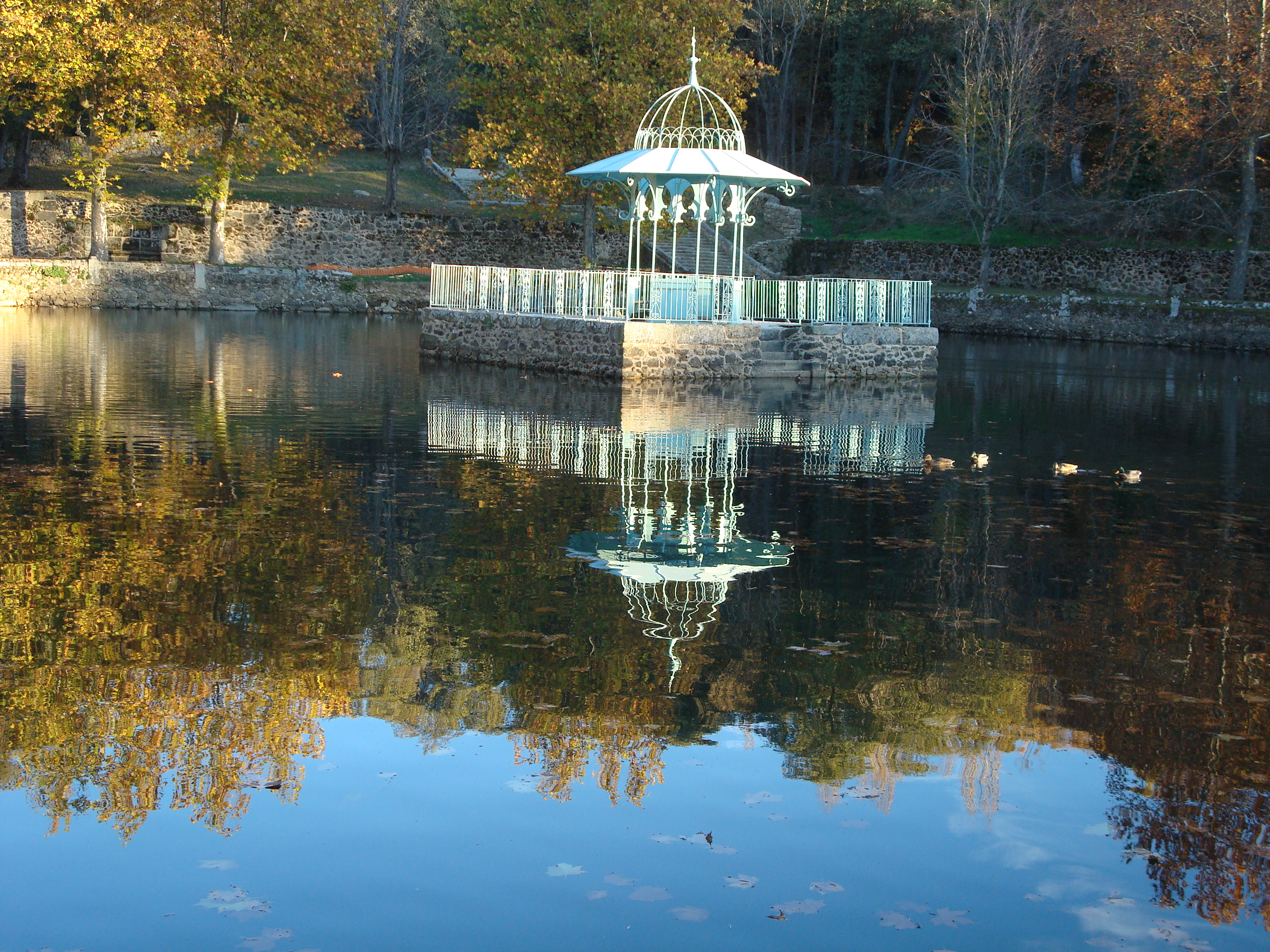 Bejar - 058